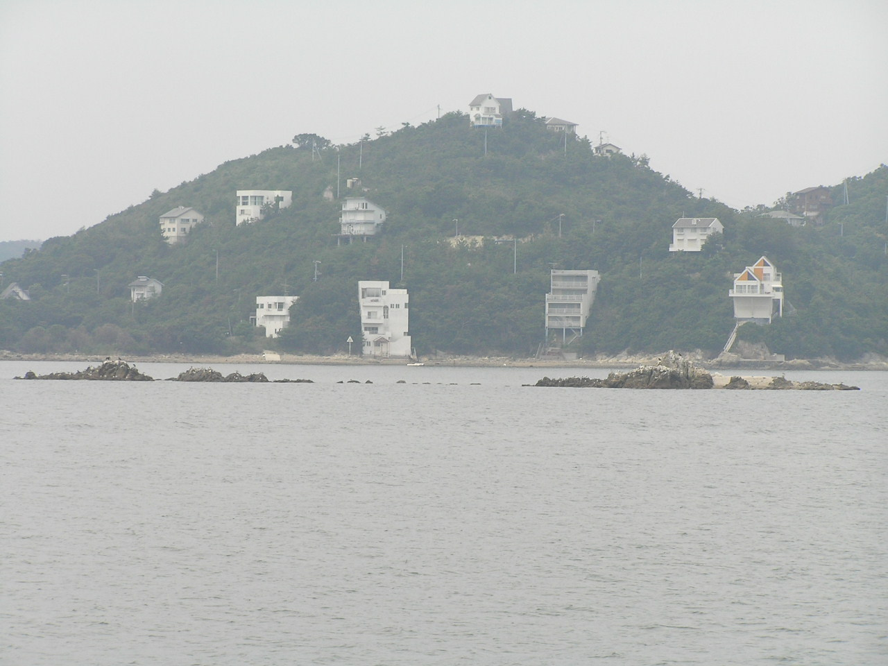 大生汽船 より Kou island in Bizen, Okayama,Japan 岡山県備前市日生町日生,鴻島